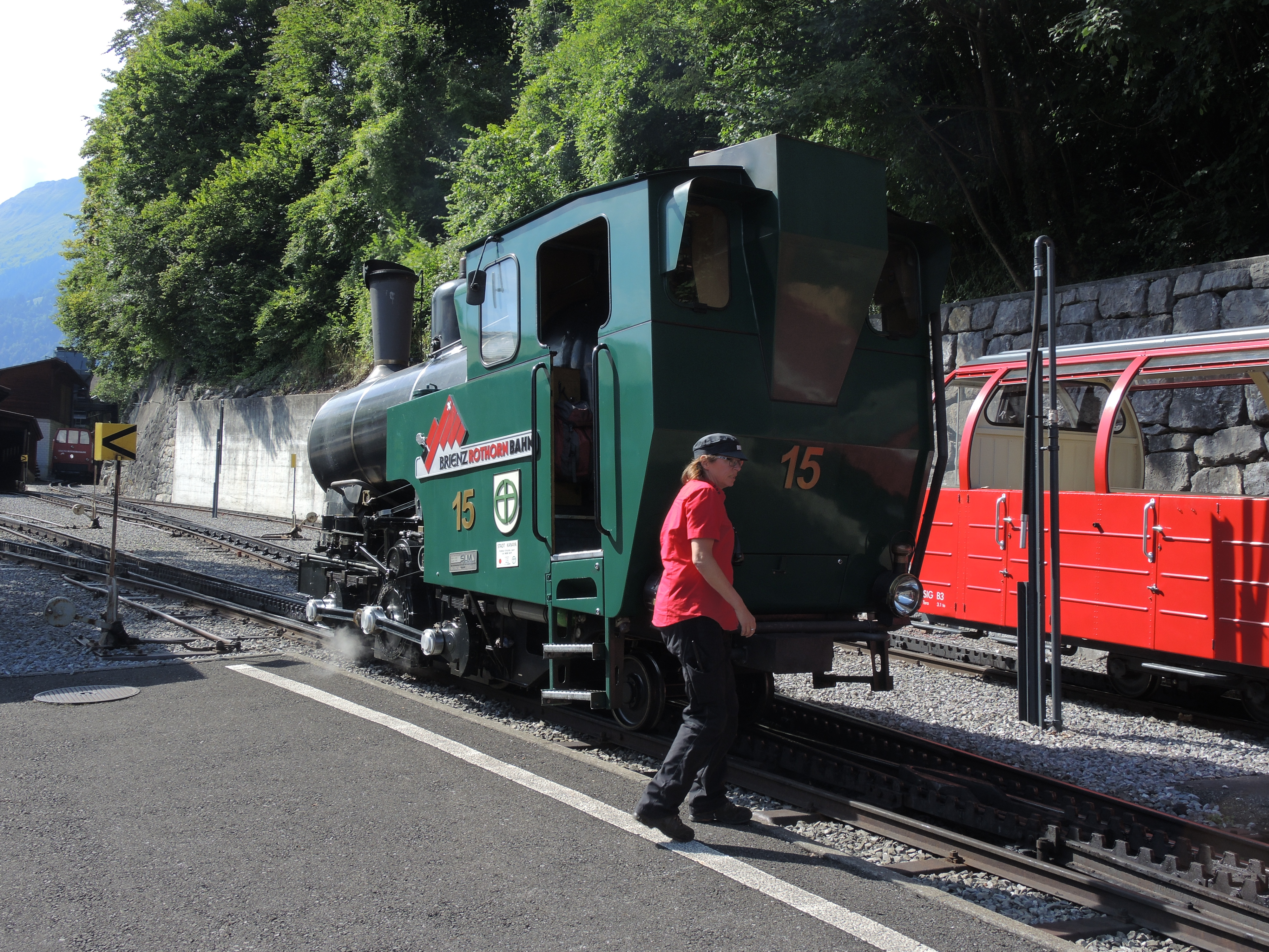 Brienz Rothhorn Bahn (BRB) at Brienz BRB train station (Switzerland)